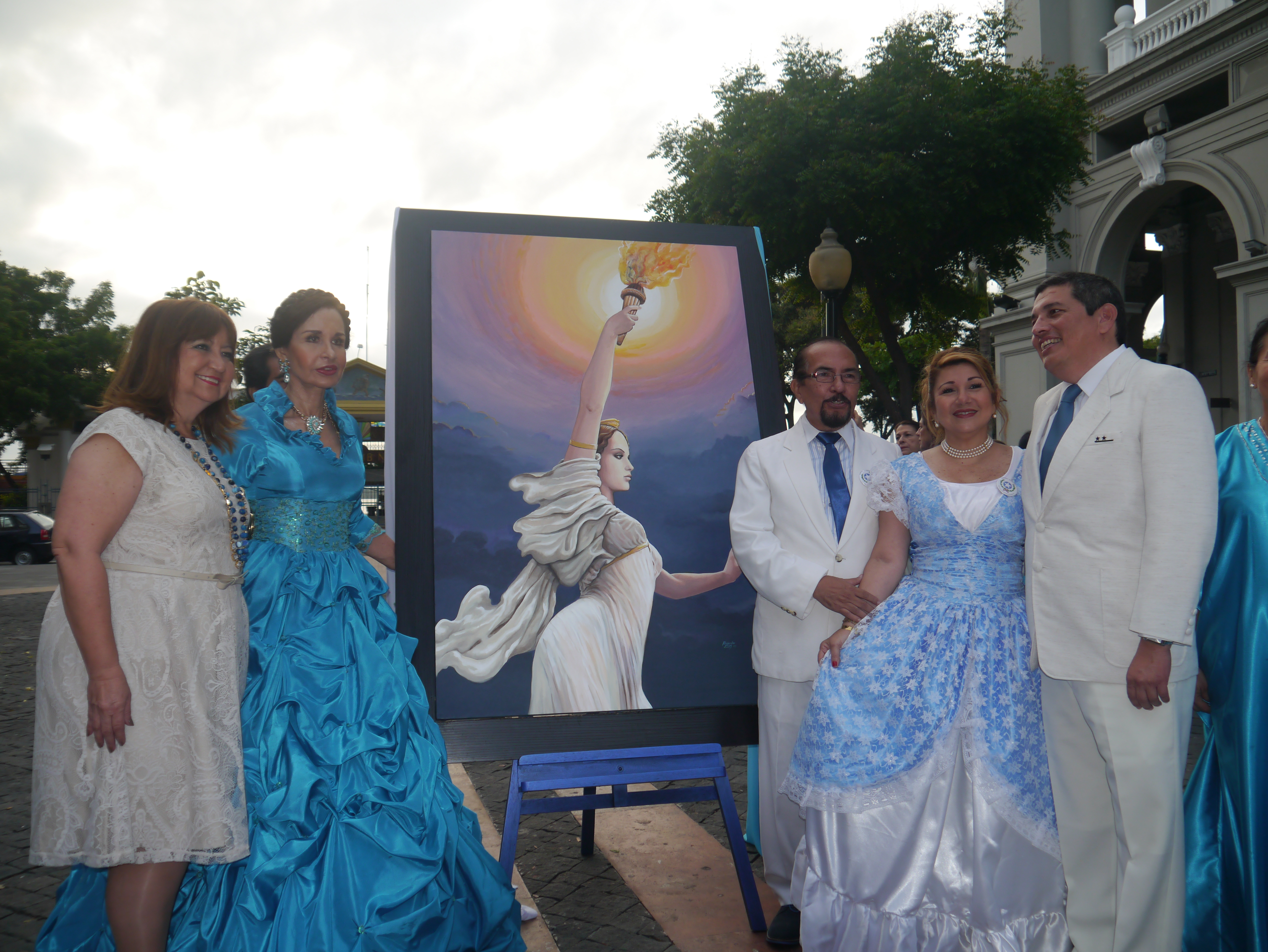 Participantes y organizadores del Saludo a la Aurora Gloriosa 2015